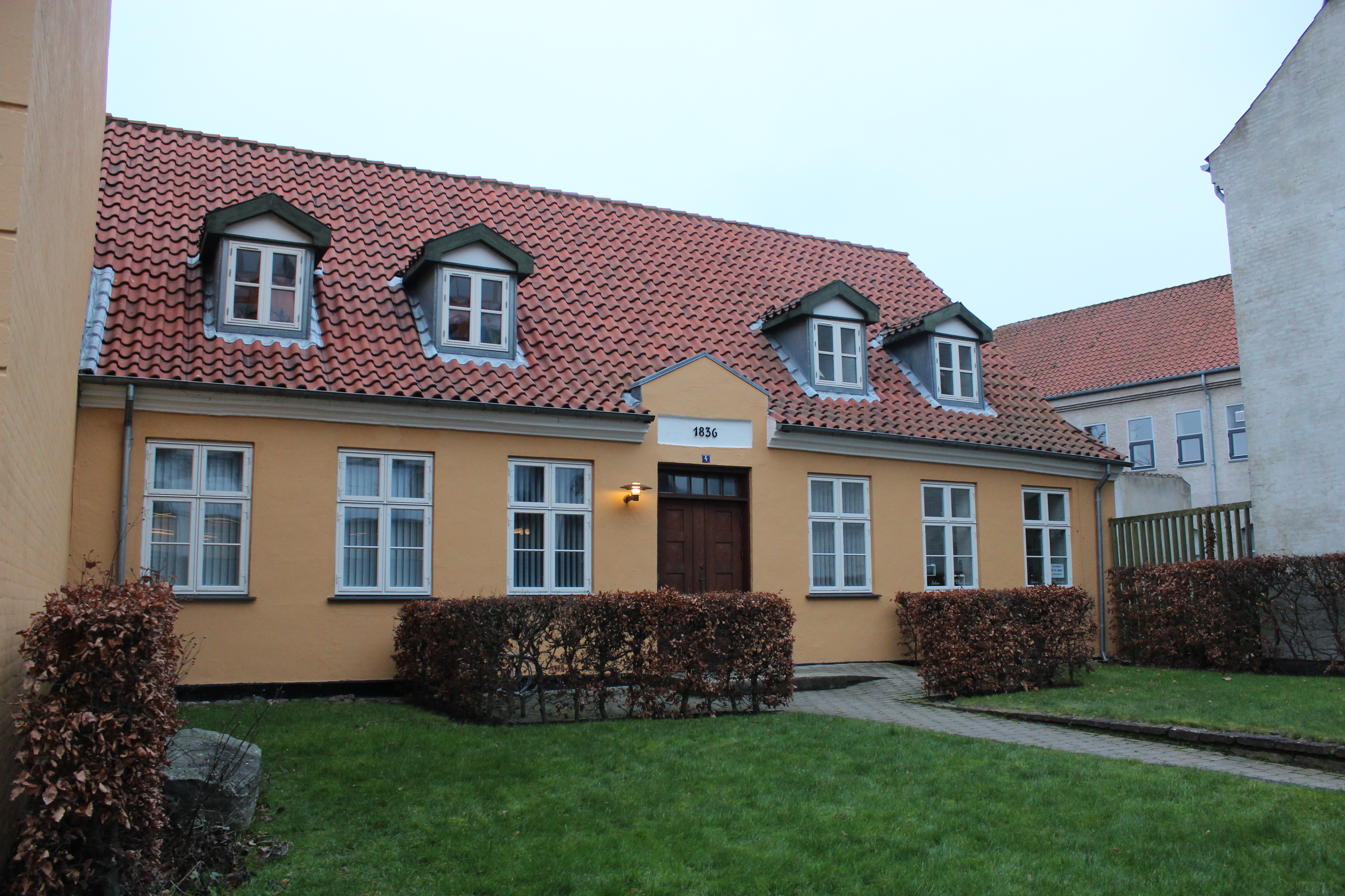 Hus i Nykøbing Falster opført i 1826.